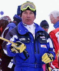 Karl Schranz